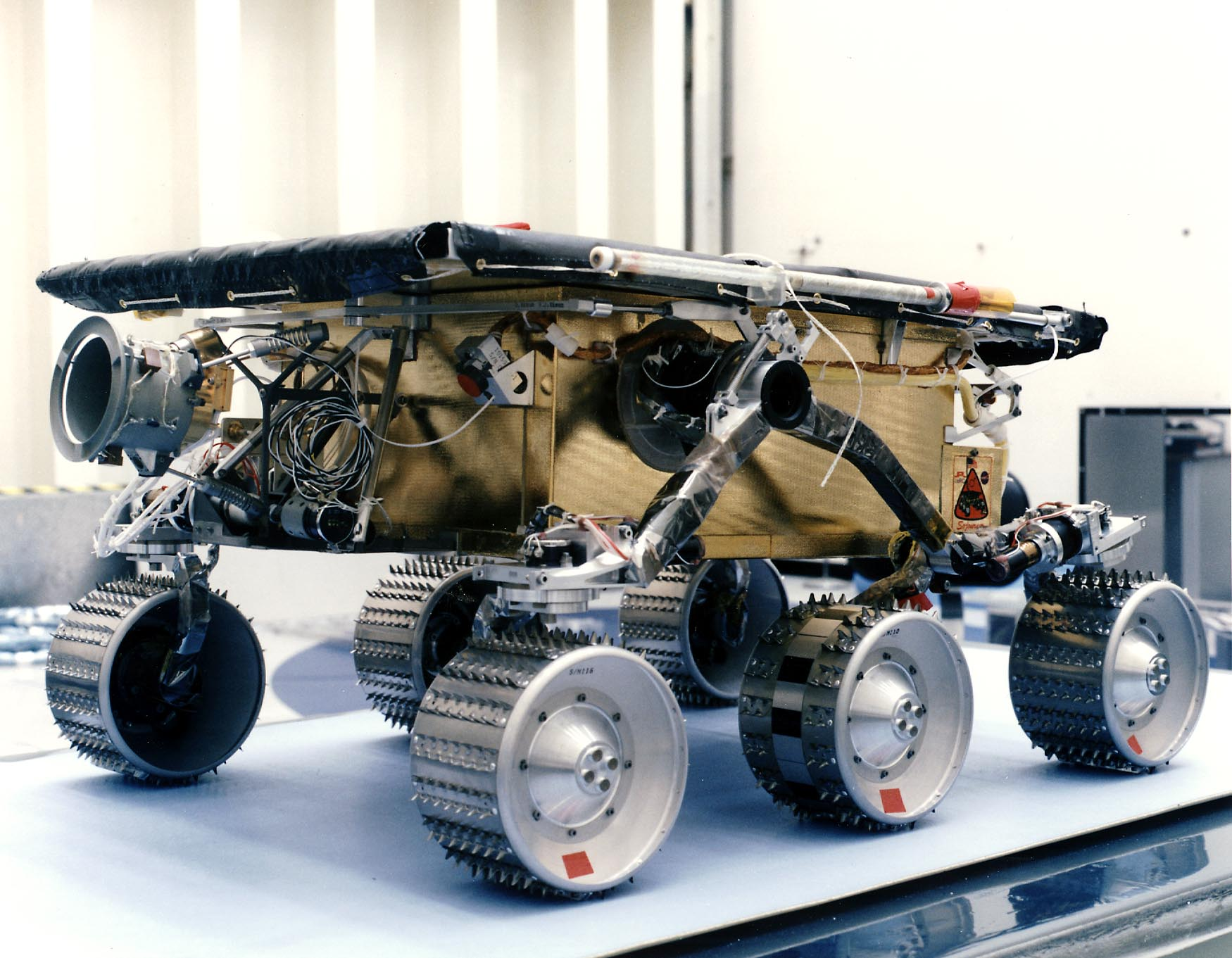 Mars Pathfinder Rover Sojourner